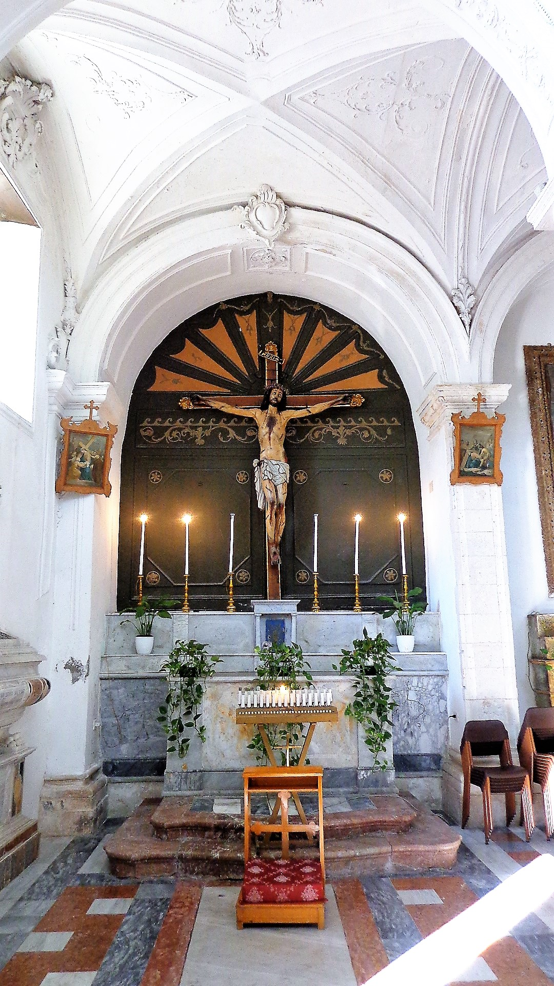 Altare del Santissimo Crocifisso, Crocifisso opera di fra Innocenzo da Petralia